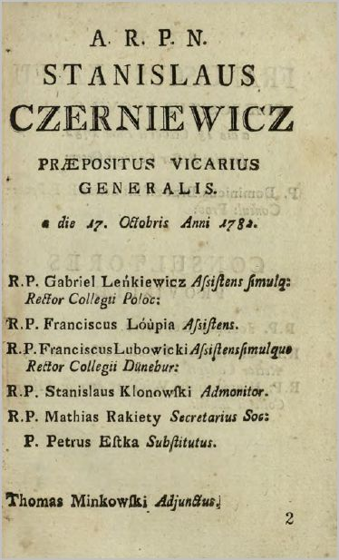 Старонка з Каталога Таварыства Ісуса на Беларусі за 1784/85 год